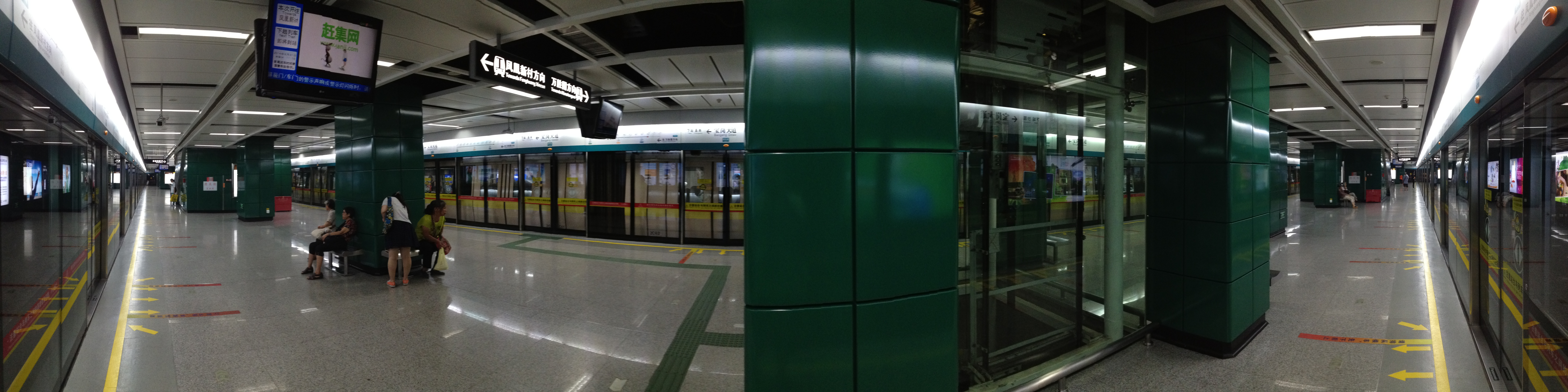 广州地铁宝岗大道站月台全景图